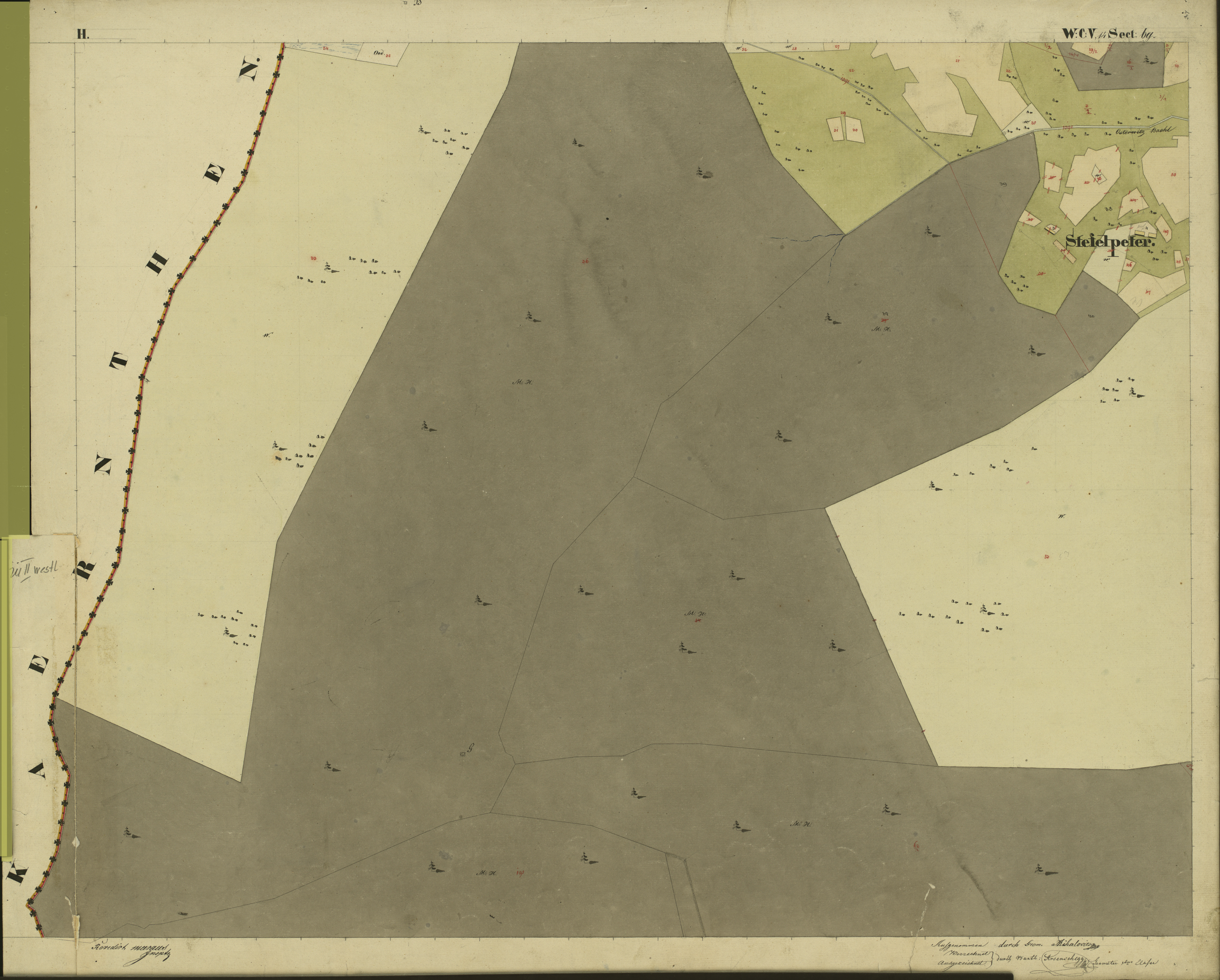 historische Vermessungskarte: österreichischer Kataster, Gemeinde Osterwitz. 1823. Blatt II Osterwitz Winkel, Einzugsgebiet des Stoffbaches, südlich See Eben, Gebiet Steffelpeter, Talschluss des Rettenbachtales